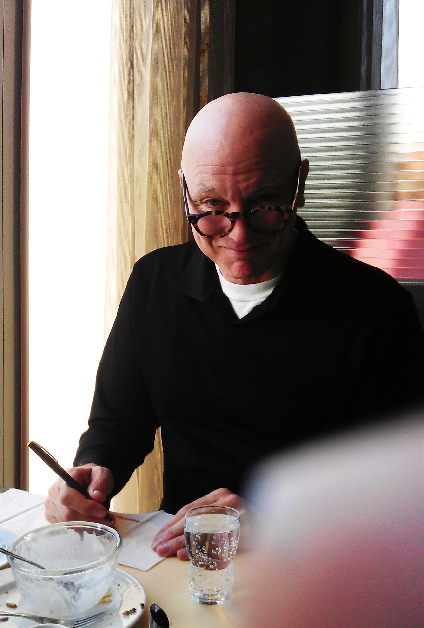 Rob Miller